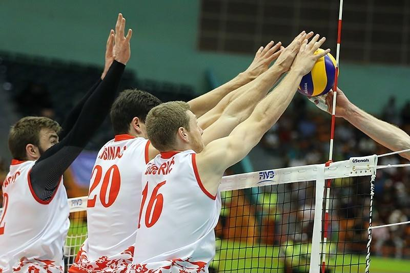 لیگ جهانی والیبال-دیدار صربستان و ایتالیا